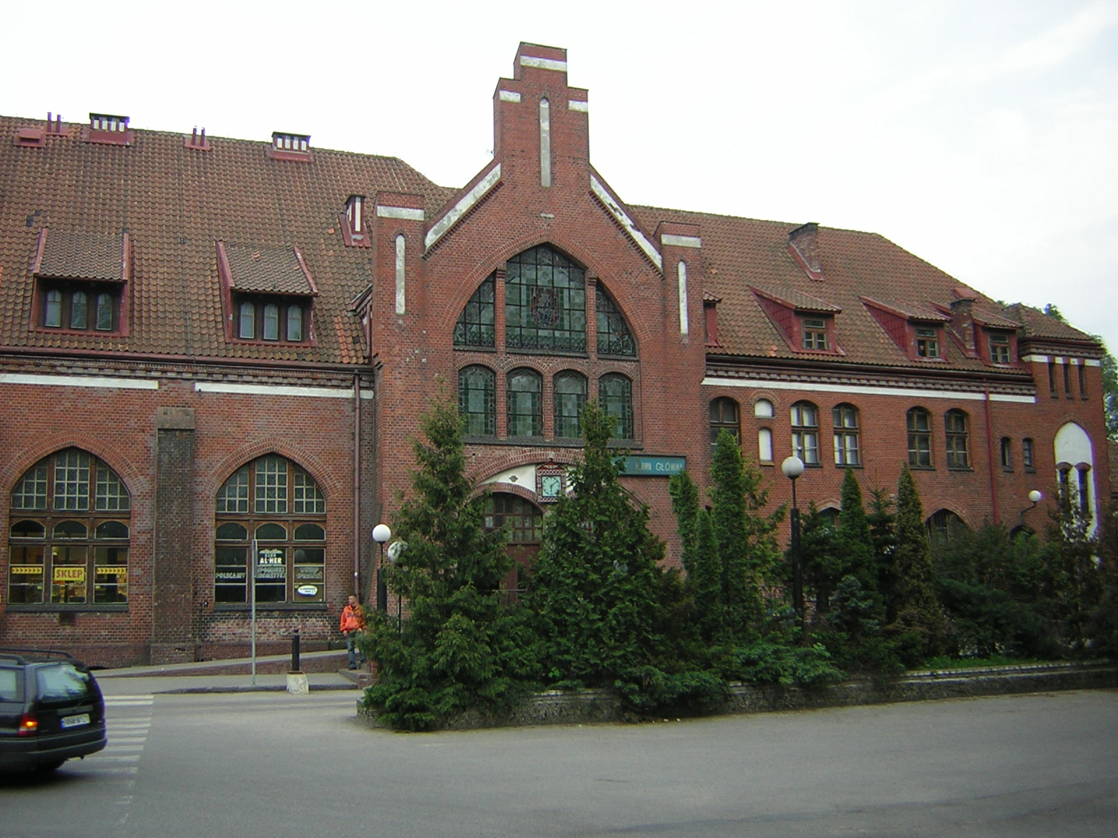 Dworzec Iława Główna Marcin nMARCIN N 18:37, 27 May 2006 (UTC)